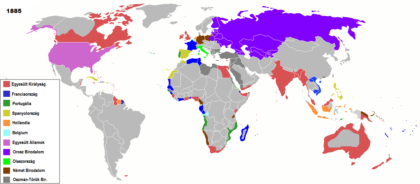 A fő hódító hatalmak és területeik 1885-ben - a mai országok területére vetítve